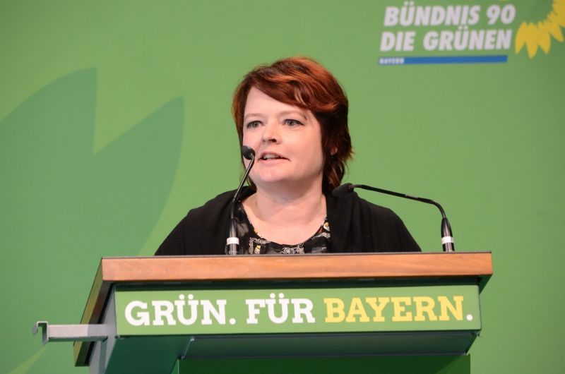 Verena Osgyan, Mitglied des Bayerischen Landtags, auf dem Parteitag der bayerischen Grünen am 7. Oktober 2017 in Deggendorf.